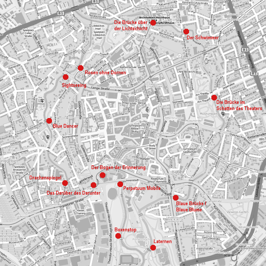 Die Projekte des Lichtparcours 2000 in Braunschweig.